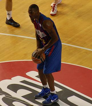 El alero estadounidense, Fenton Pete Mickeal, jugando frente al Real Madrid en los playoffs de 2012 de la Liga ACB